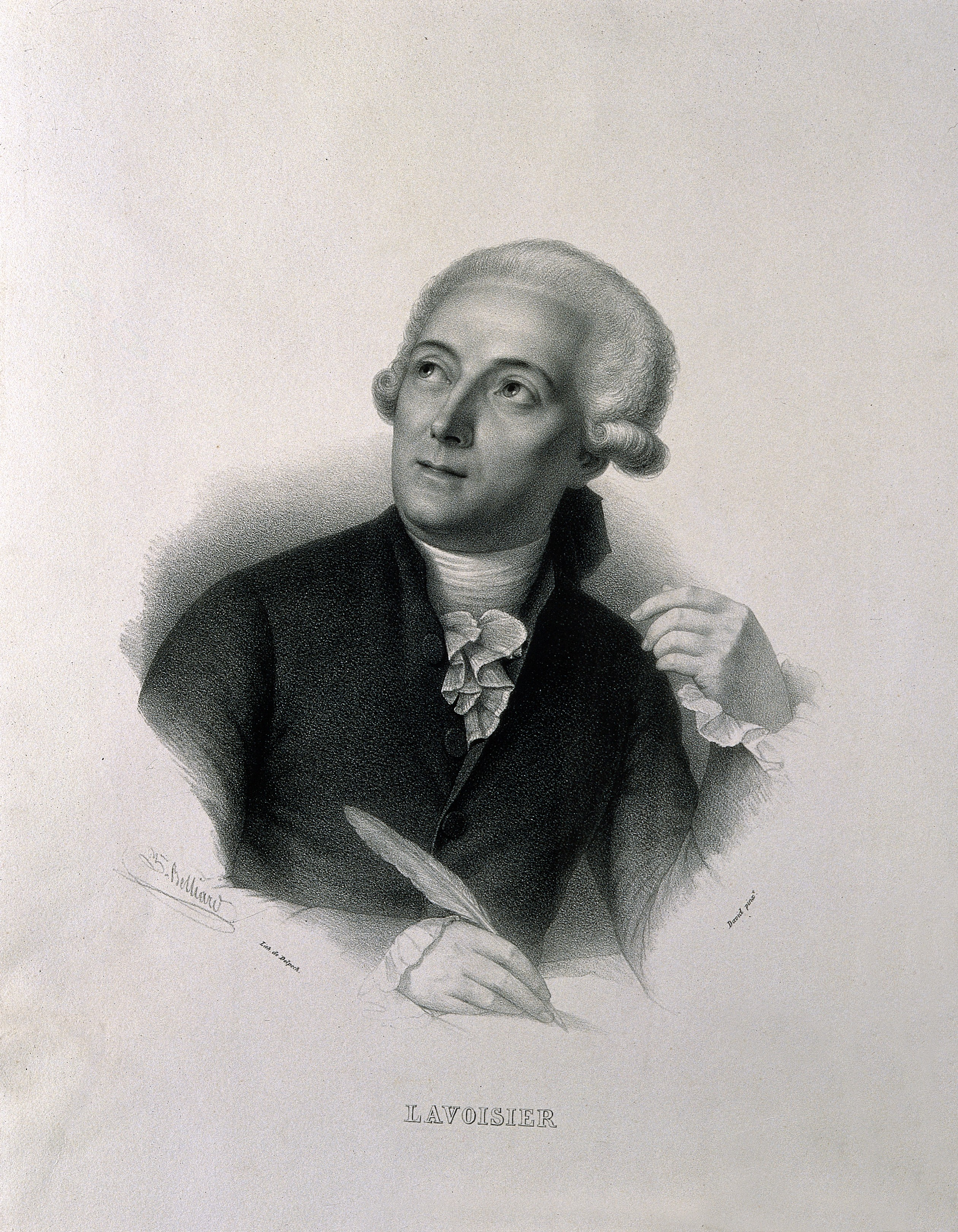 Topic-LCSH: Chemists. Genre/Technique: Portrait prints. Lithographs. Suject name: Lavoisier, Antoine Laurent, 1743-1794.